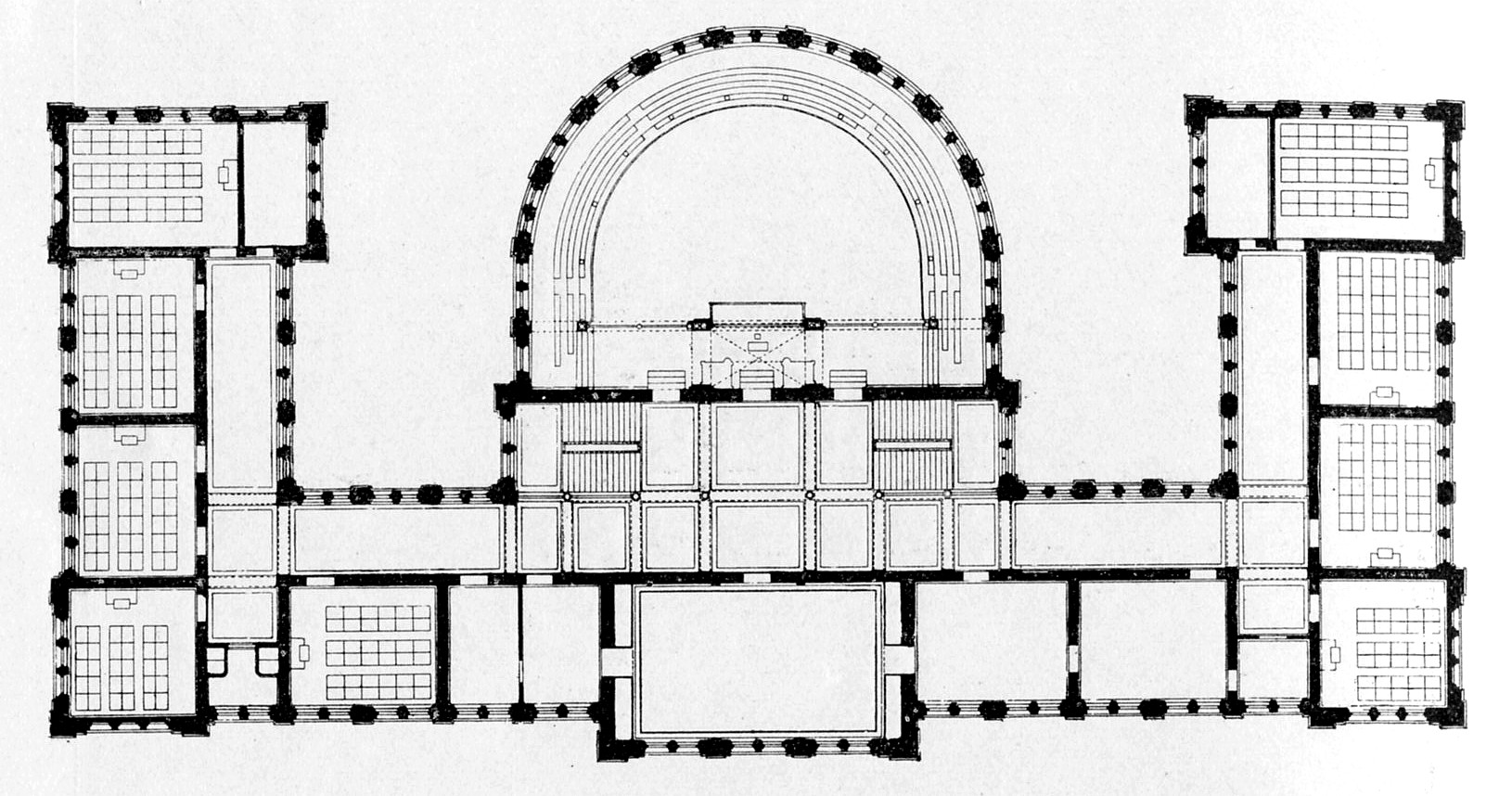 Planritning för både Norra Real och Södra Latin i Stockholm (våning 1 trappa)